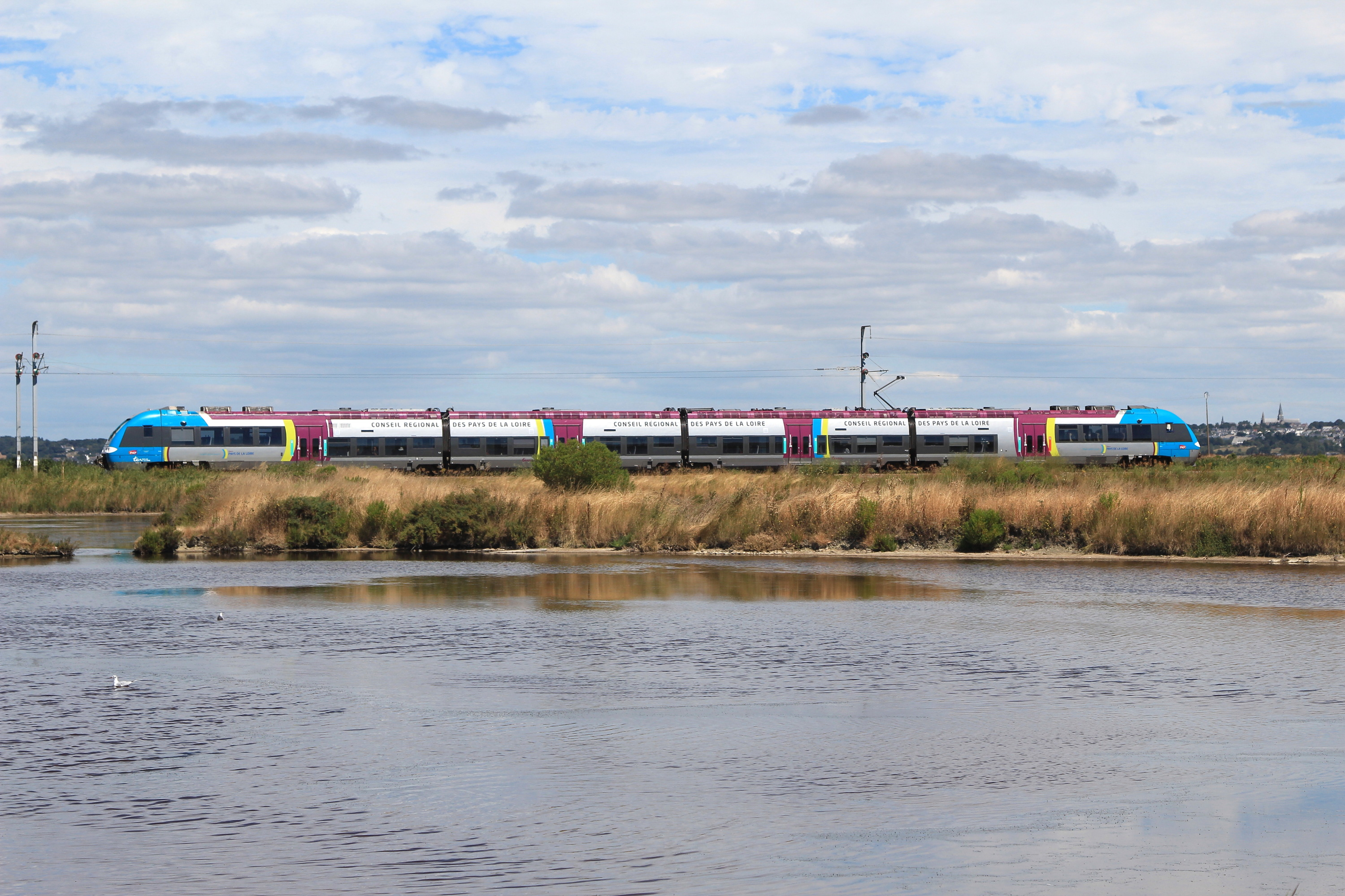 Une ZGC dans les marrais salant repart de la gare du Pouliguen assurant le TER n° 58017 (Nantes - Le Croisic).